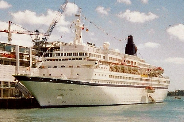 Hafen Auckland Neuseeland